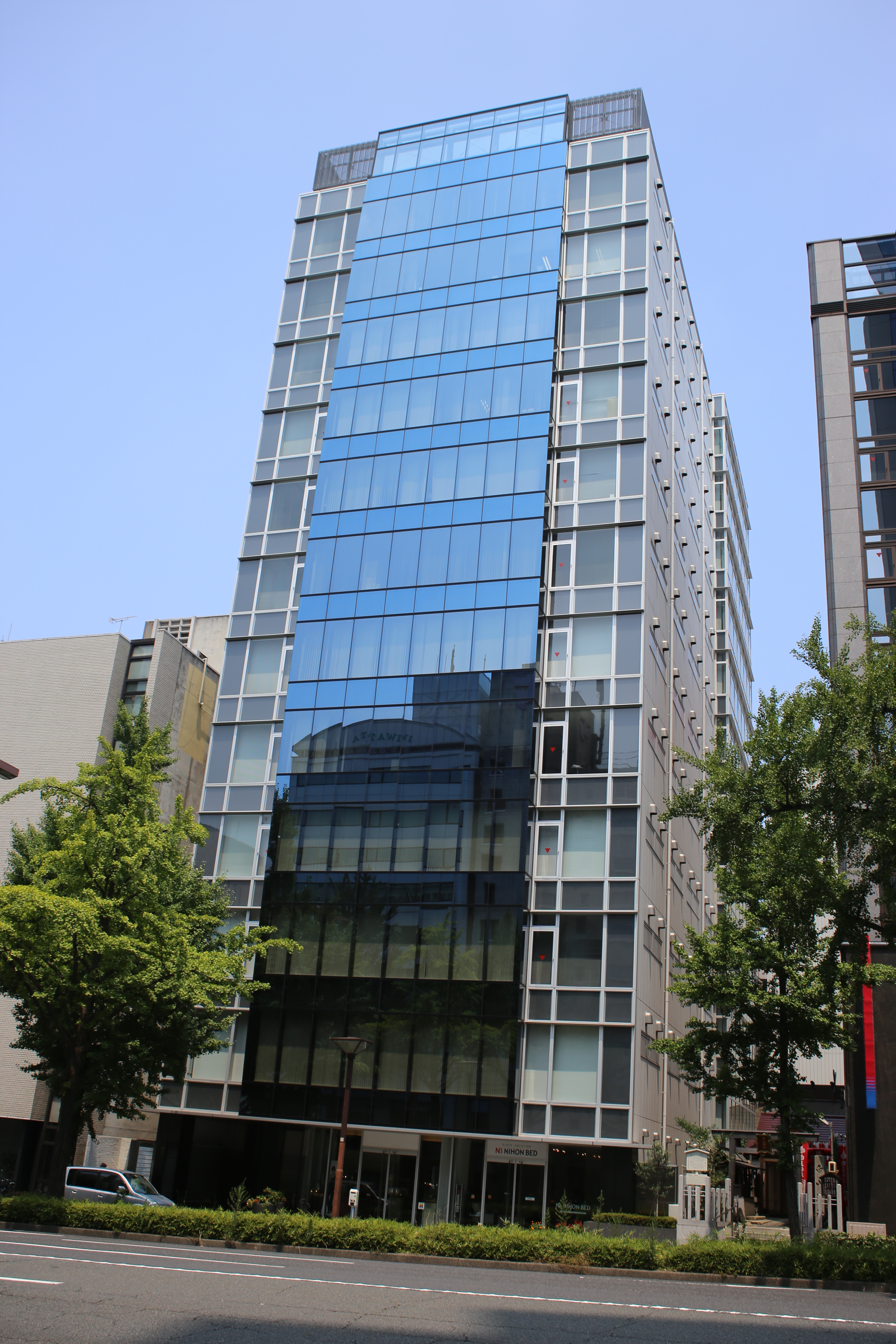 名古屋市中区丸の内一丁目のie丸の内ビルを南側公道東側より撮影